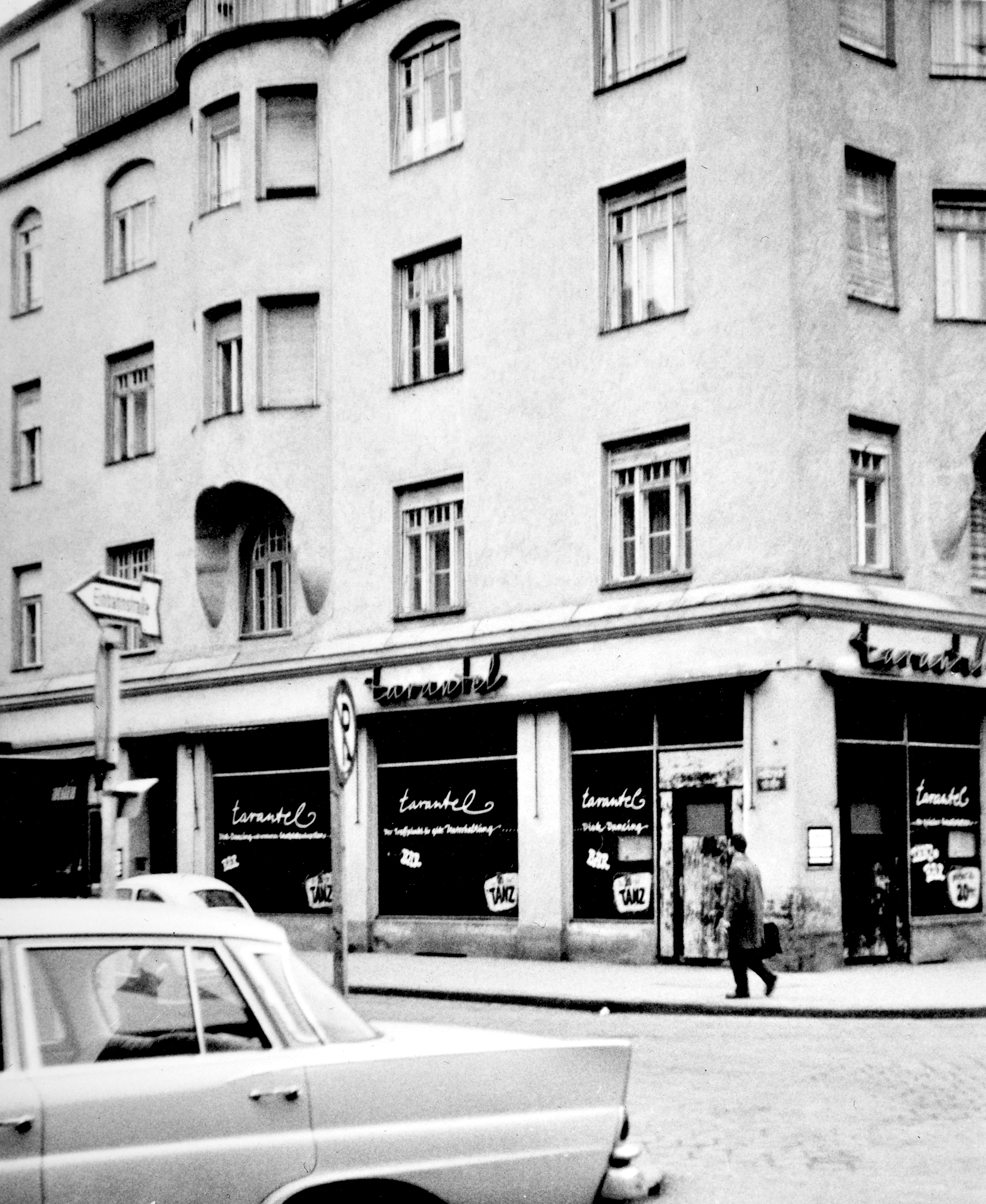 München, Schwabing. Blick von der Feilitzschstraße auf das Eckhaus Feilitzschsraße 13. Zustand 1963. Das Gebäude beherbergte seit mitte der 1950er Jahre zwei ganz bekannte, bzw, damals führende Jazz Musiklokale. Zum einen das "Tarantel" wie auf der Fotografie zu erkennen, nachmals "Scotch Bar", später "Käuzchen" und vor der Schließung die "Juke Box", noch um das Jahr 1984-1985 zu finden. Sammlung Fentriss.